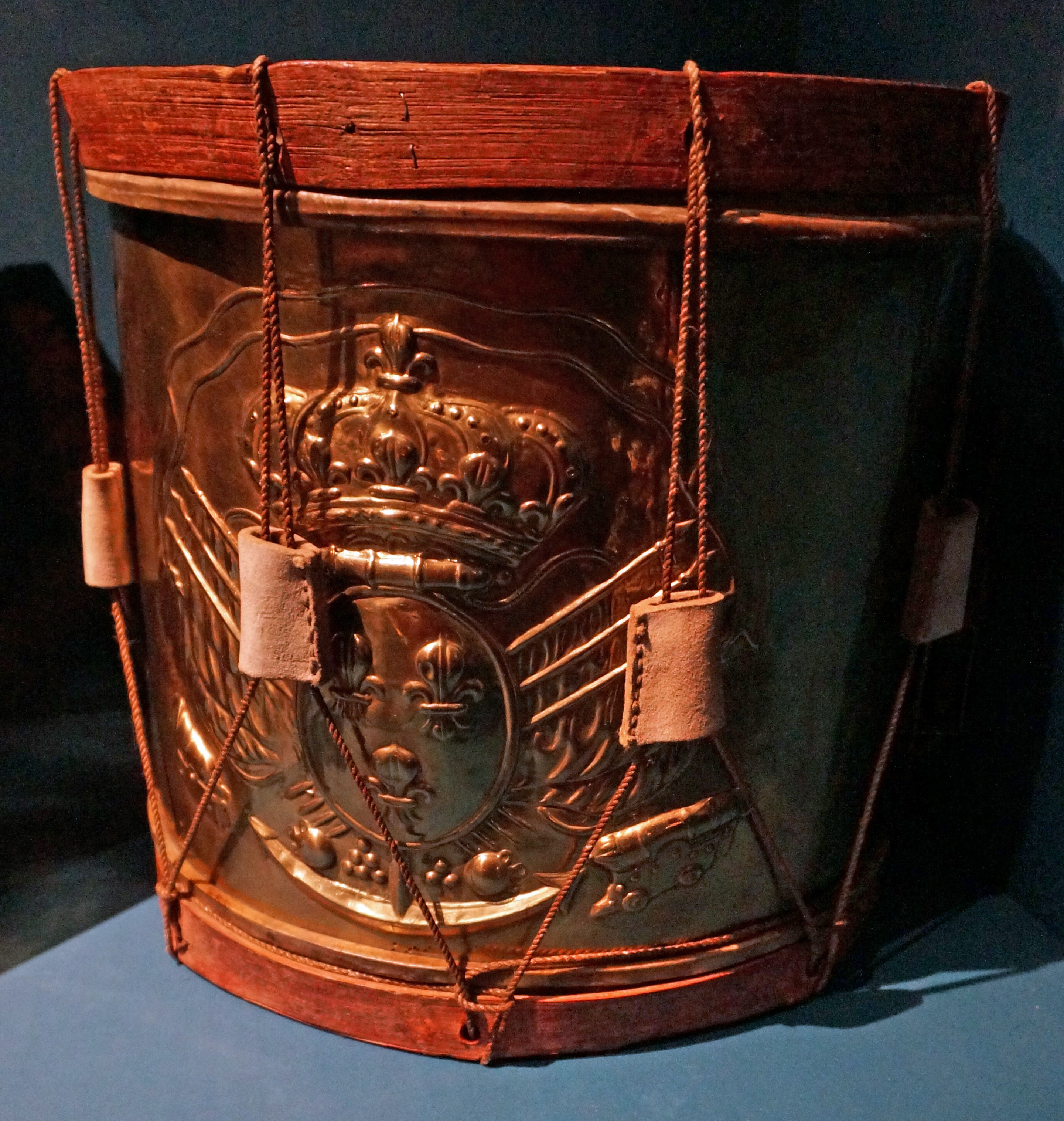 Présenté lors de l'exposition Indochine des territoires et des hommes 1856 1956.